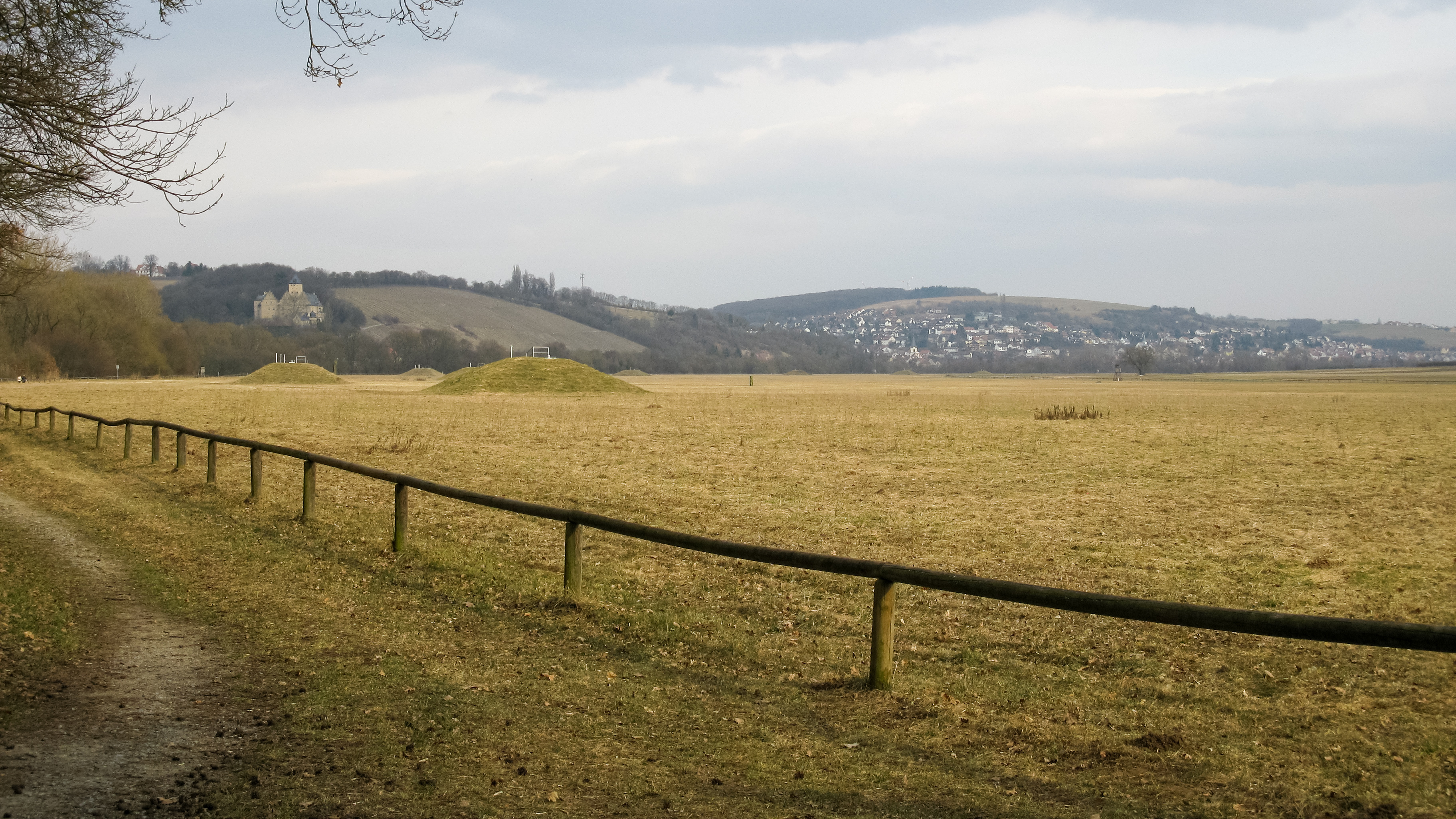 (LSG:BY-LSG-00084.01)_Schutz eines Landschaftsteils im Bereich der Stadt Schweinfurt und des Landkreises Schweinfurt - Blick vom Parkplatz Richtung Sennfelder See